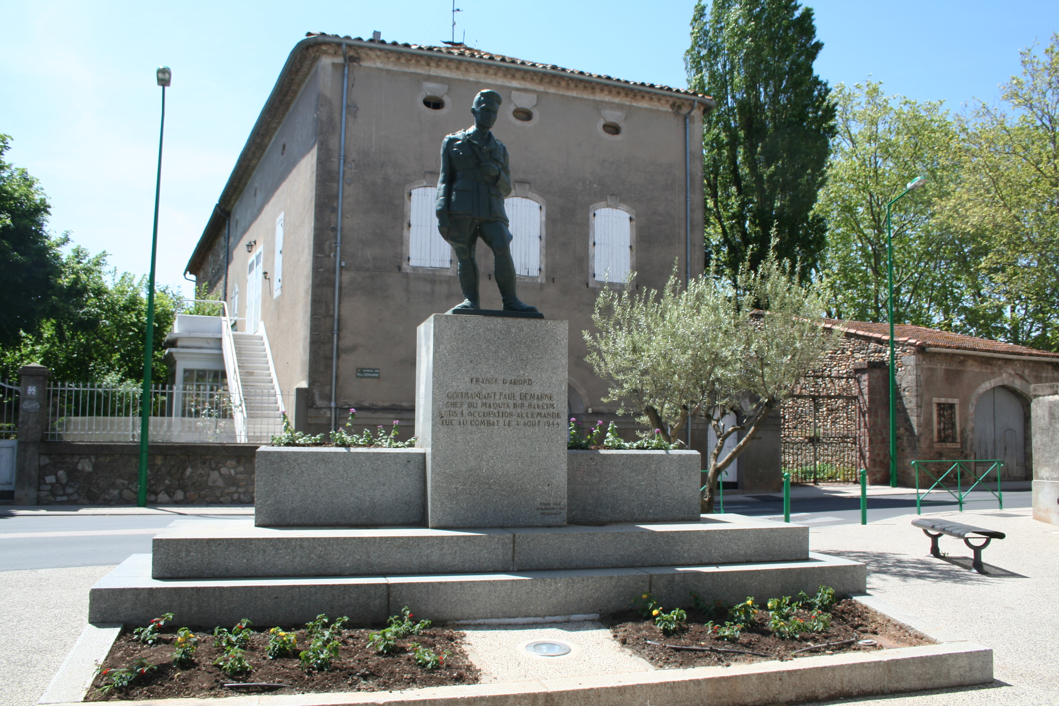 Canet (Hérault) - monument à la mémoire du commandant Paul Demarne (1904-1944), chef du maquis Bir Hakeim, tué au combat le 4 August 1944 près de Gignac.